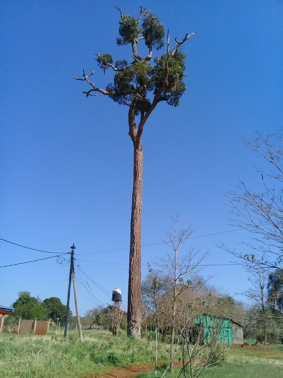 El Palo Rosa apocynaceae es un árbol autctono del noreste de la Argentina situado en la población de la comunidad Mbya guaraní " Fortín Mborore" en Iguazu, Misiones Palo Rosa